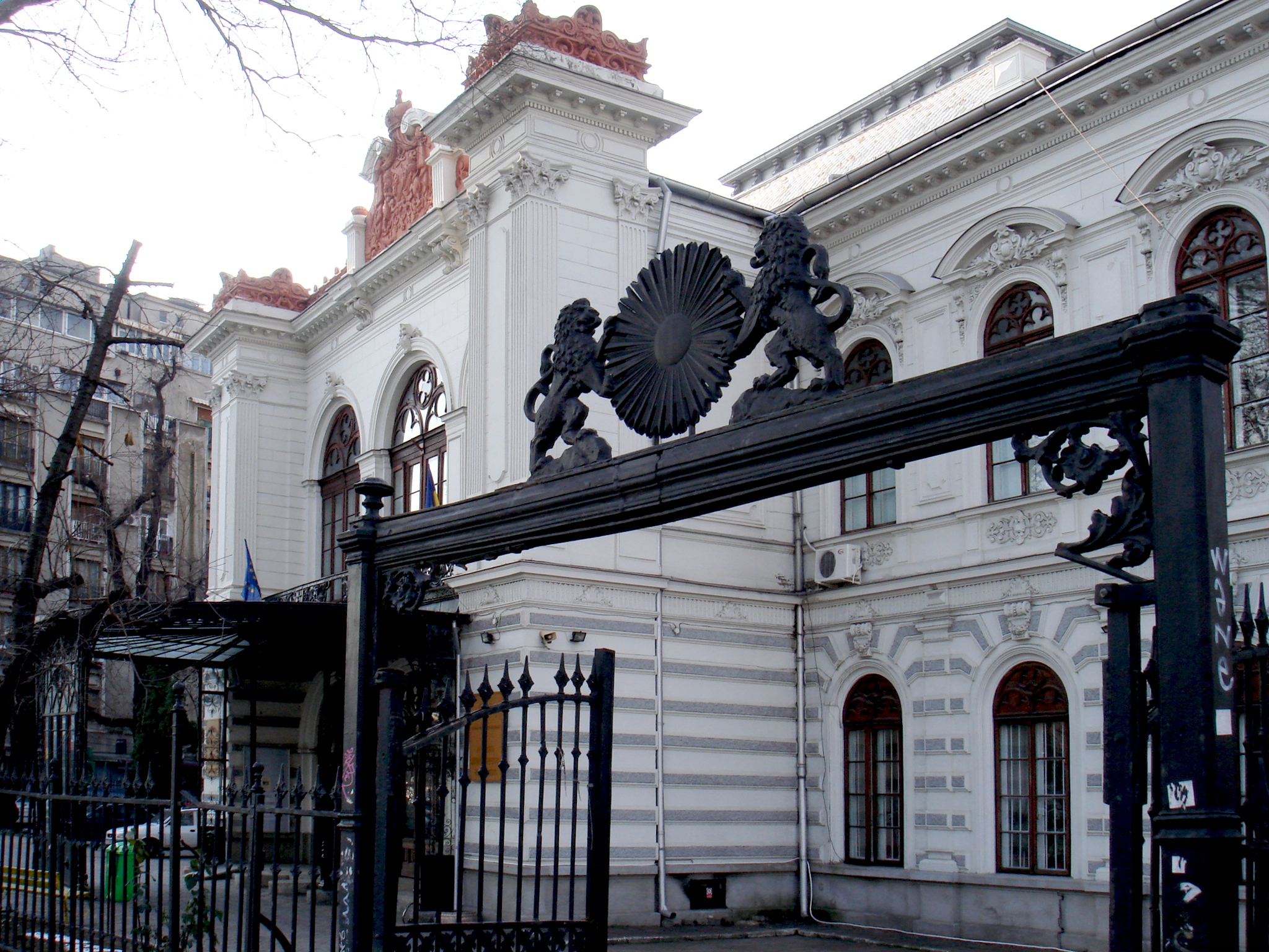 Poarta curţii palatului Şuţu din Bucureşti